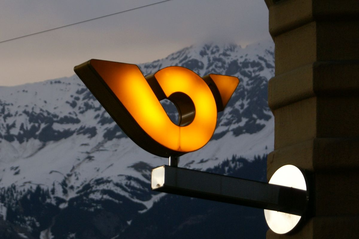 Logo vor einem Postamt in Innsbruck.